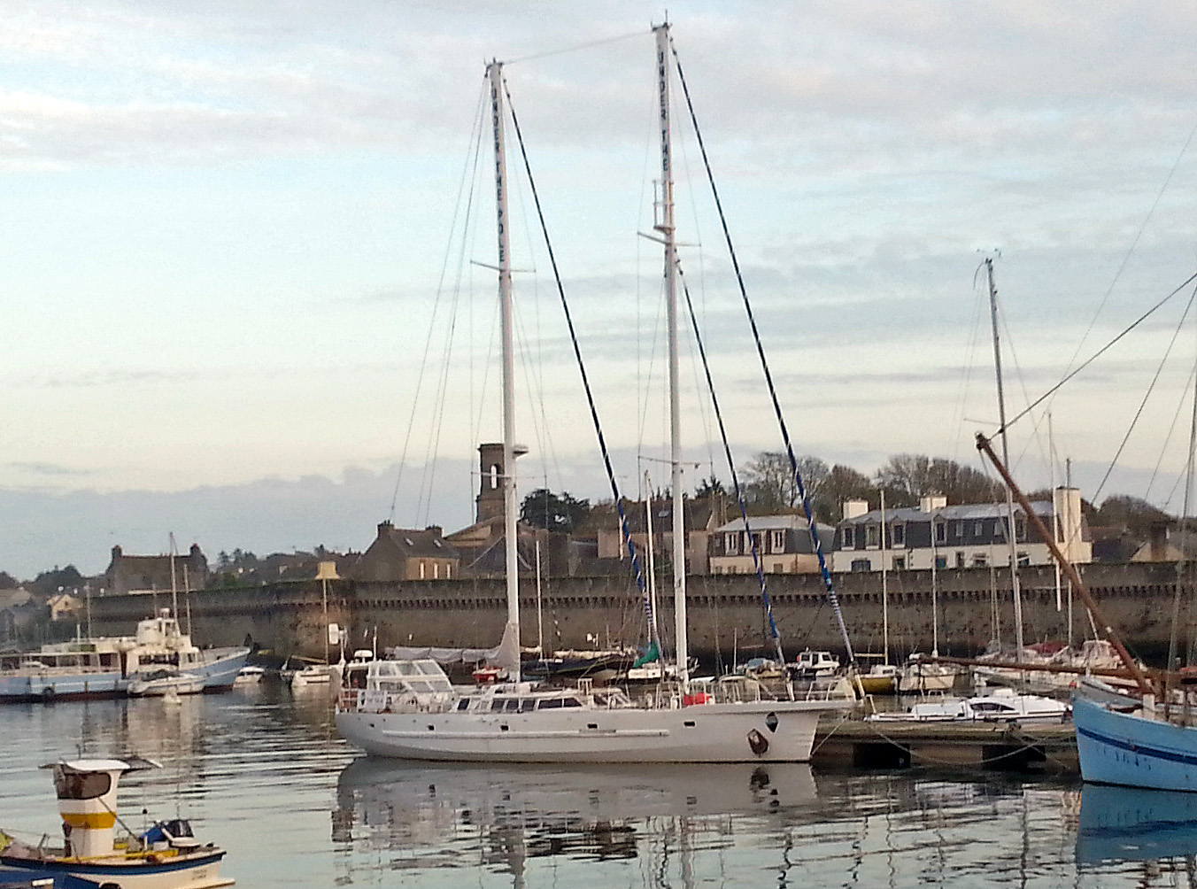 Le Why (navire de l'Expéditions Under The Pole) dans le port de Concarneau en novembre 2015.